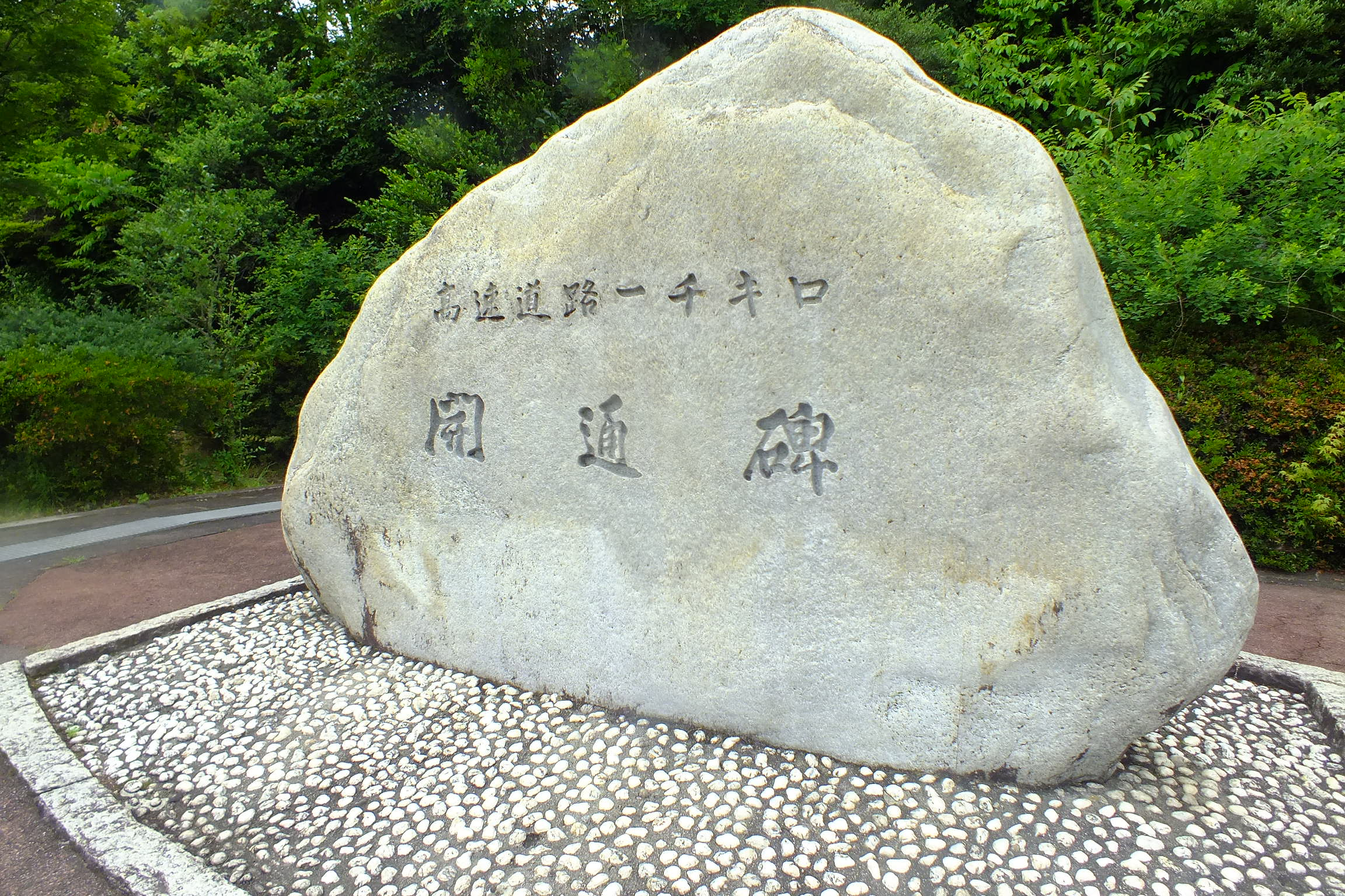 2017-06-29 Kokeizan-PA(虎渓山パーキングエリア) 高速道路1000㎞開通碑